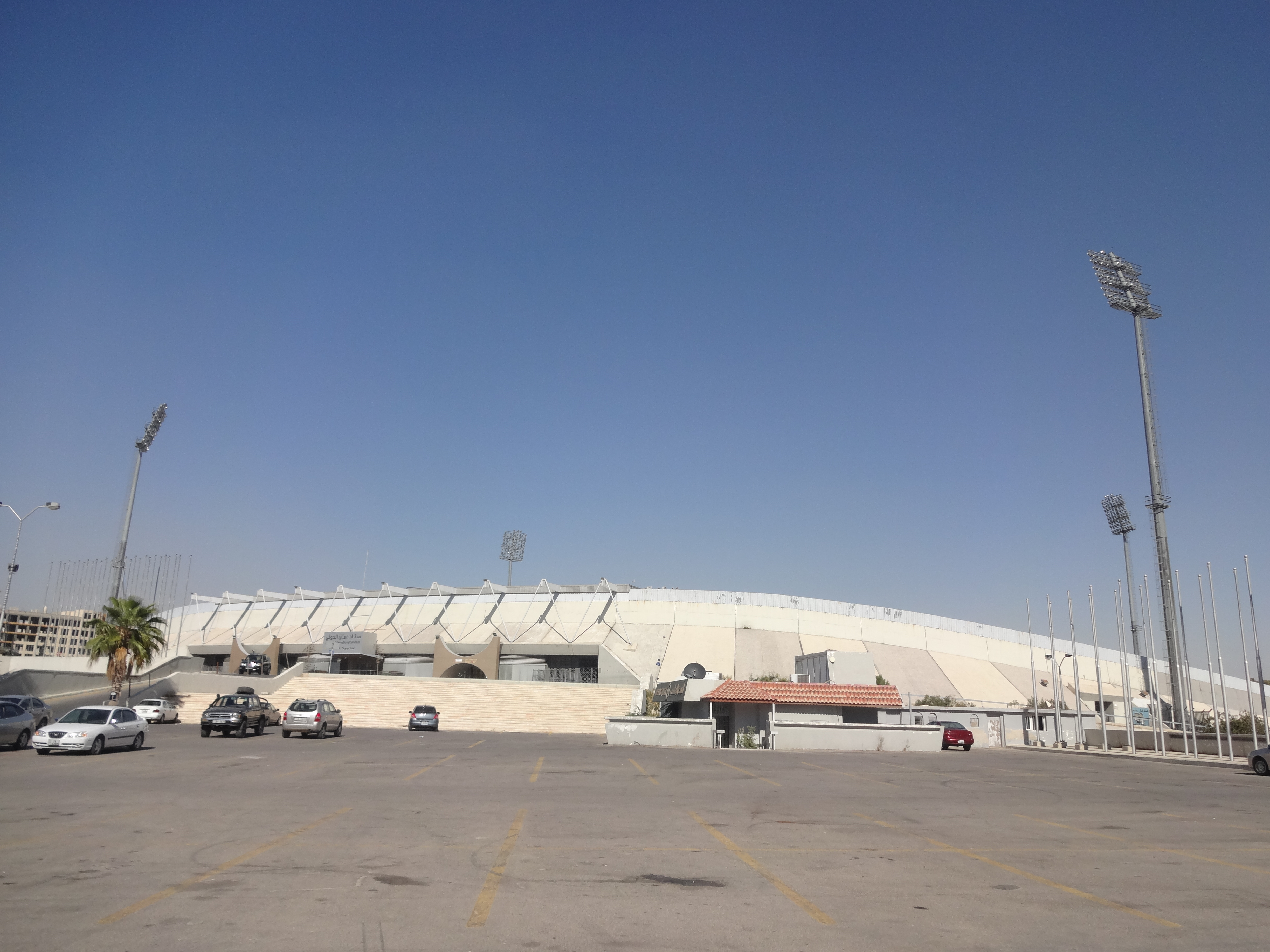 Staad Amman Aldowali, Amman, Jordan